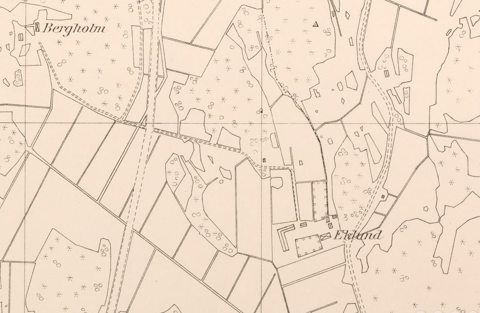 Eklundska gården och torpet Bergholm